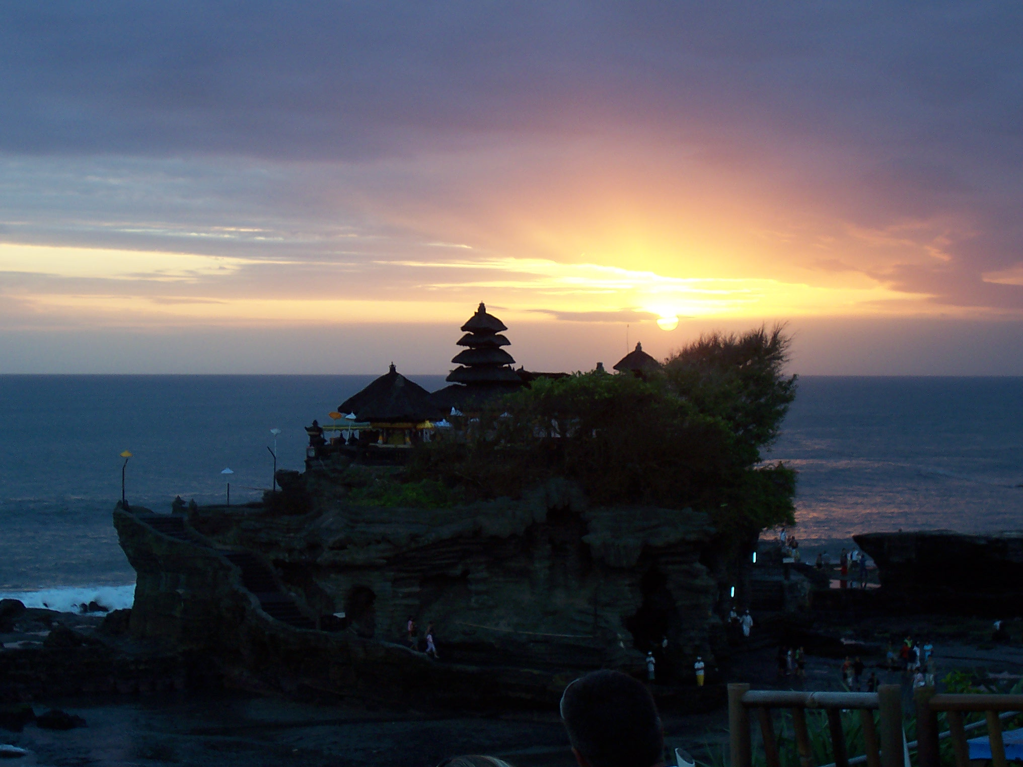 Pura Tanah Lot sunset